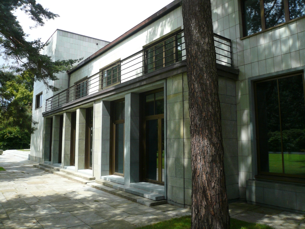 Haus K. in O. -Villa Reemtsma - in Hamburg Othmarschen: Wohnzimmer